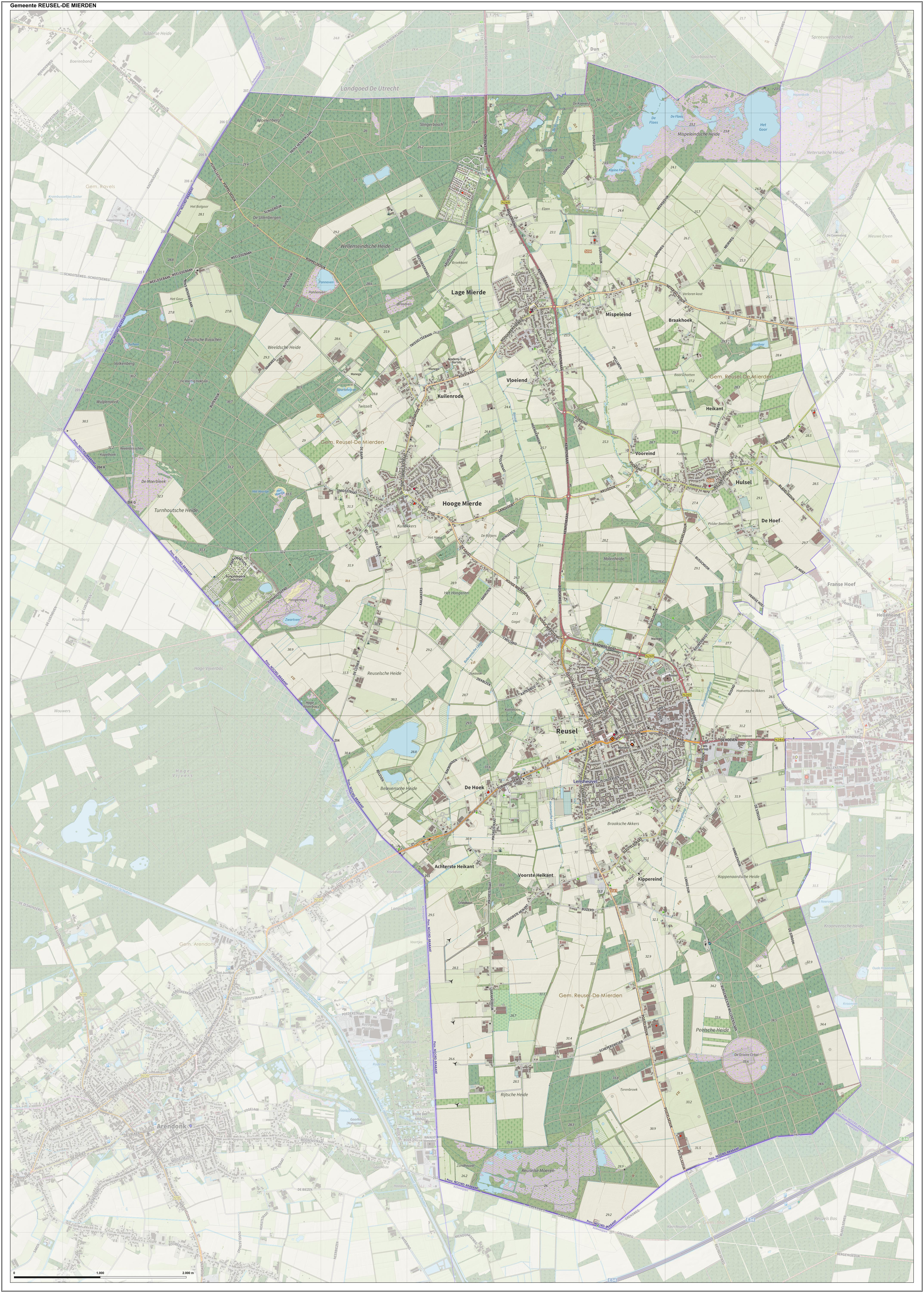 Topografische gemeentekaart. Resolutie: 400 pixels/km. Kaartbeeld samengesteld uit de open geodata van de Top10NL en Top25namen (Kadaster), Creative Commons-BY licentie. Gebouwvlakken uit open geodata BAG extract. Wegen uit de OpenStreetMap, OpenStreetMap community. Reliëfschaduw uit de Actuele Hoogtekaart AHN2. Samenstelling en kleurenschema: Jan-Willem van Aalst, met QGIS. Zie ook de Legenda.